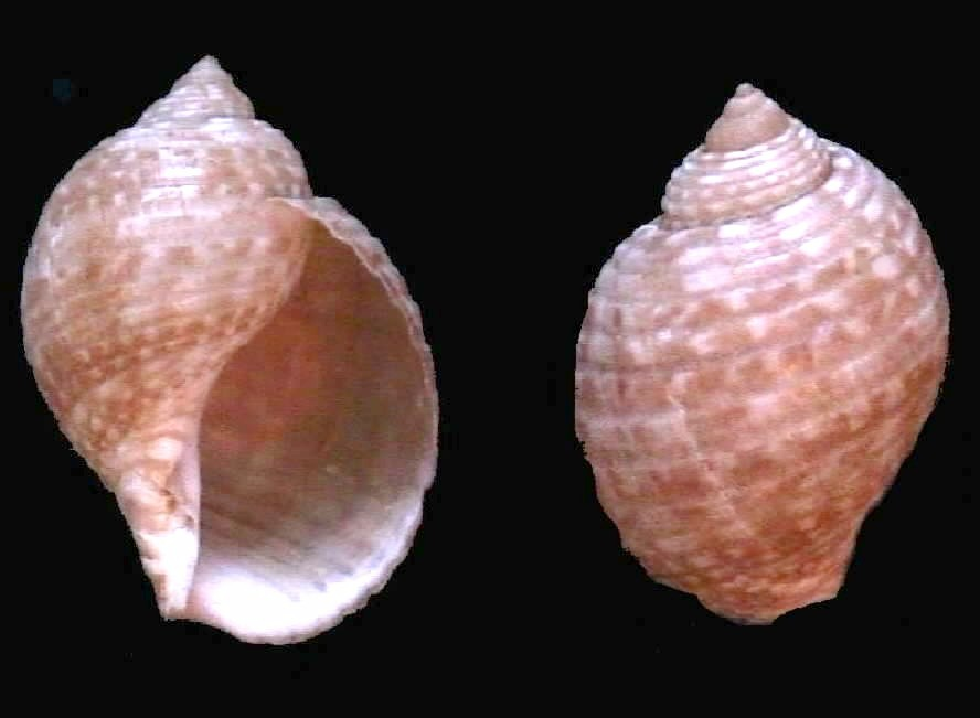 Tonna pennata (Mörch, 1853) (synonym: Tonna maculosa); Isla de Margarita, estado Nueva Esparta - Venezuela